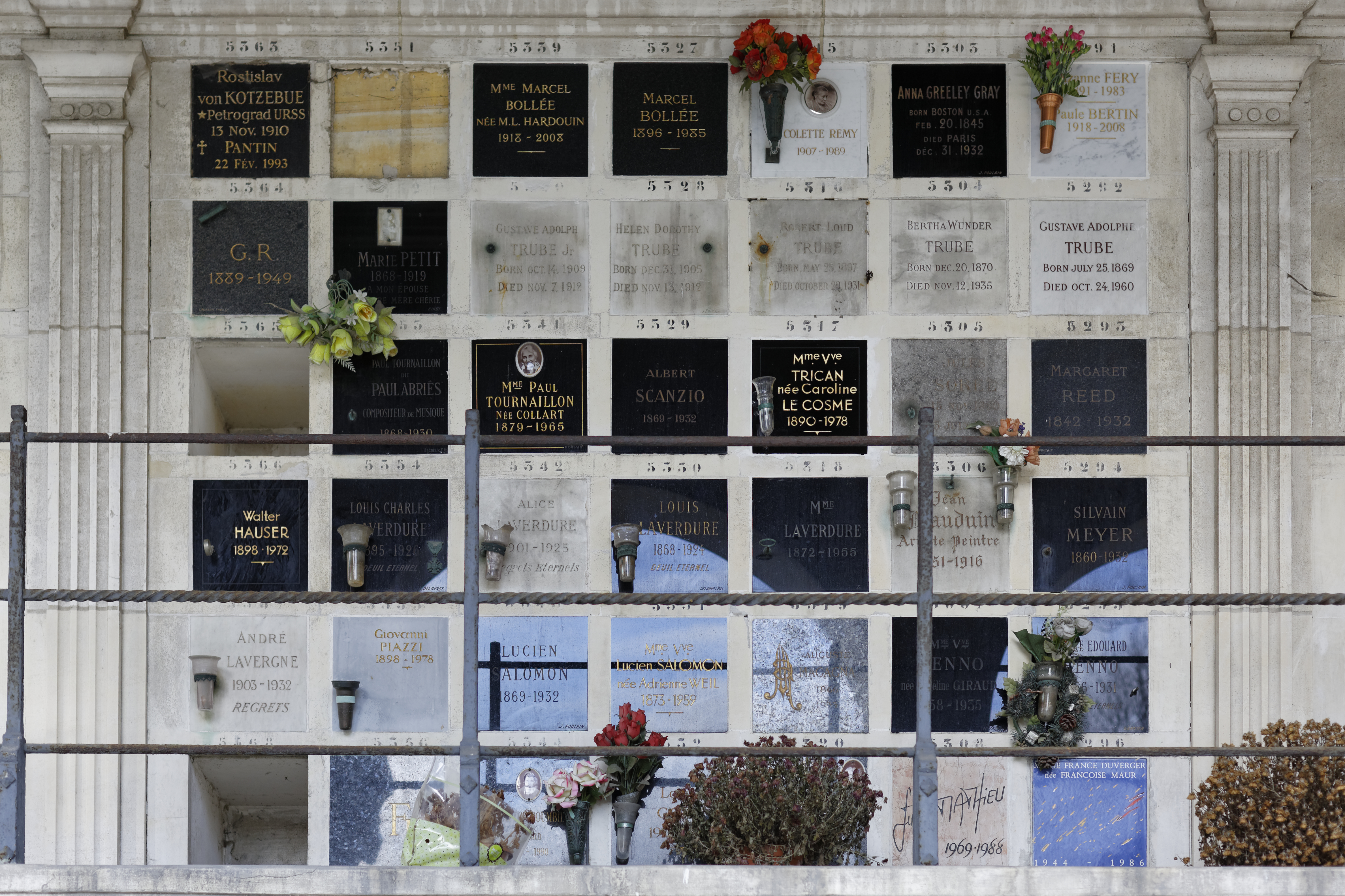 Cases du columbarium du cimetière du Père-Lachaise.